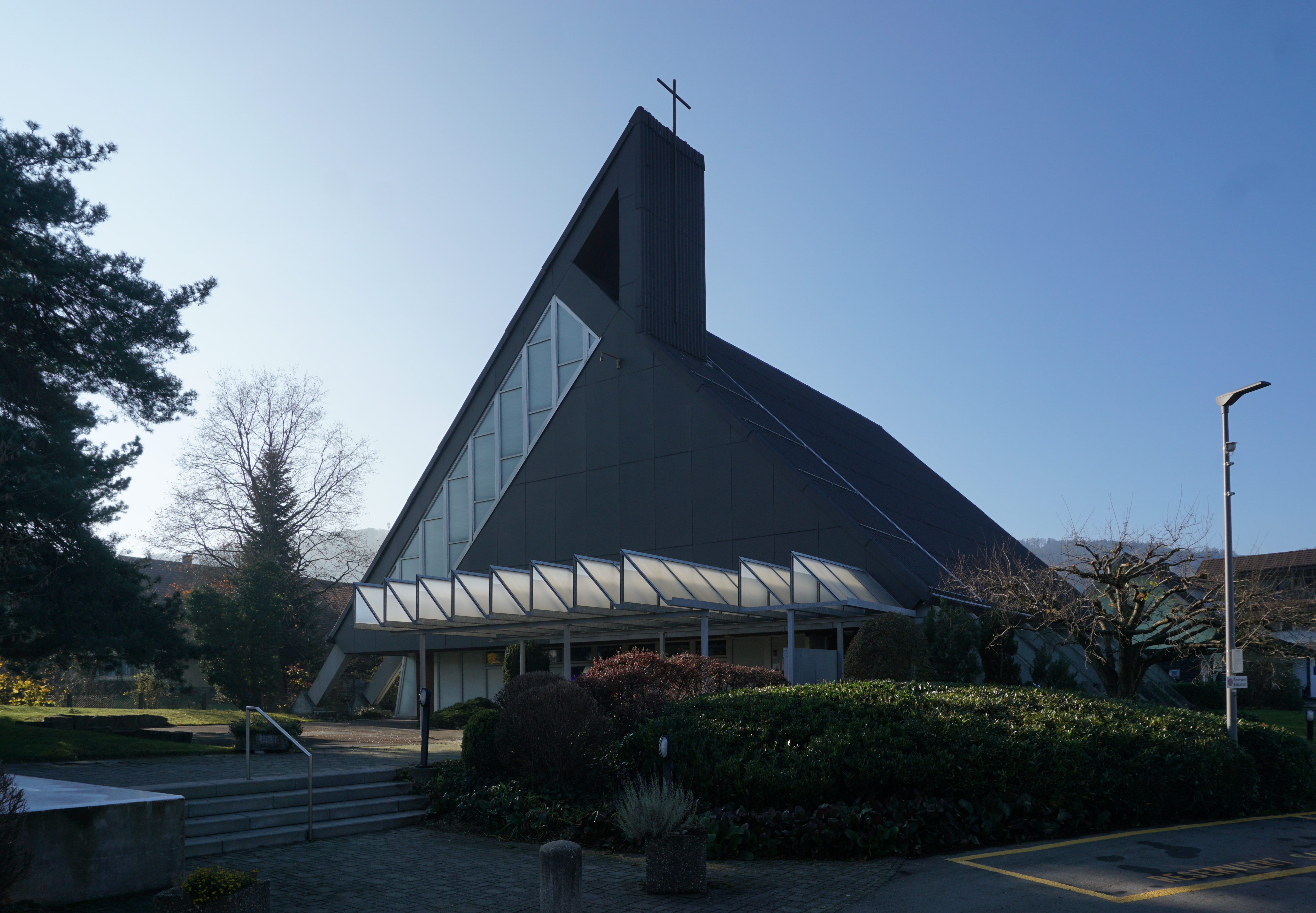 Die Heiliggeist-Kirche von Belp, Nordseite